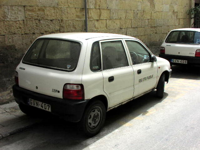 Maruti Zen hatchback